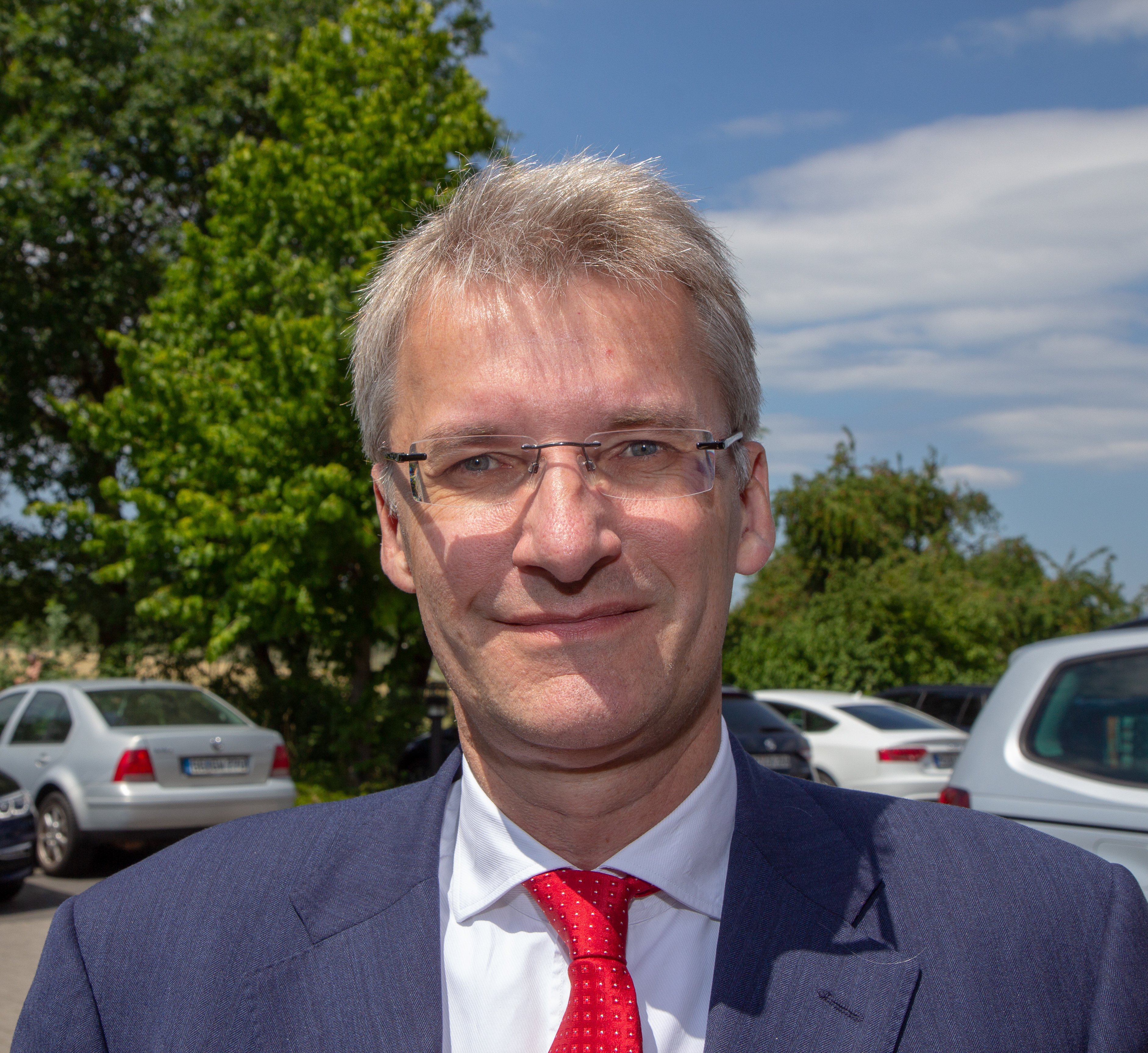 Elmar Theveßen als Teilnehmer bei der Sitzung des ZDF-Fernsehrat am 29. Juni 2018 in Mainz.